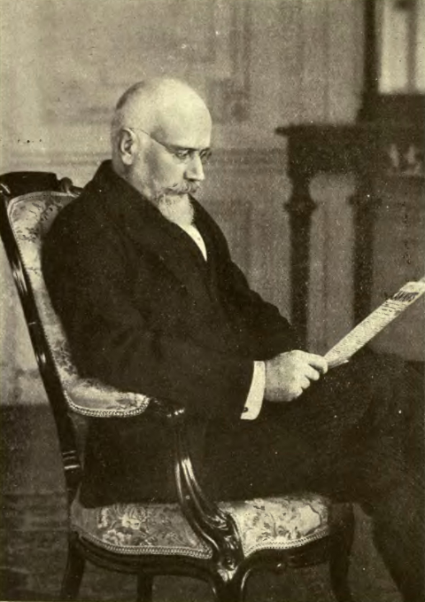 Eleftherios Venizelos, político griego.